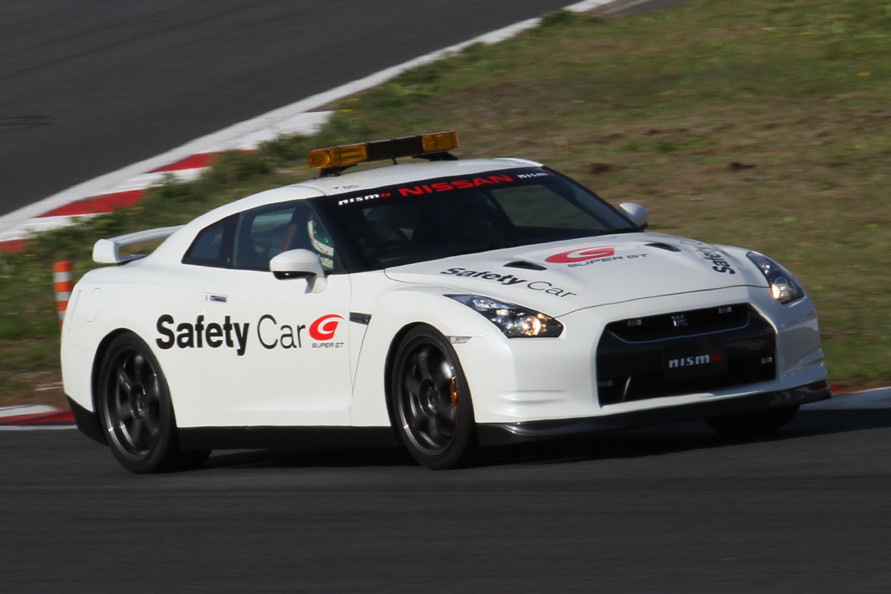 Super GT 2010 Rd.3 Fuji GT 400km: Safety Car